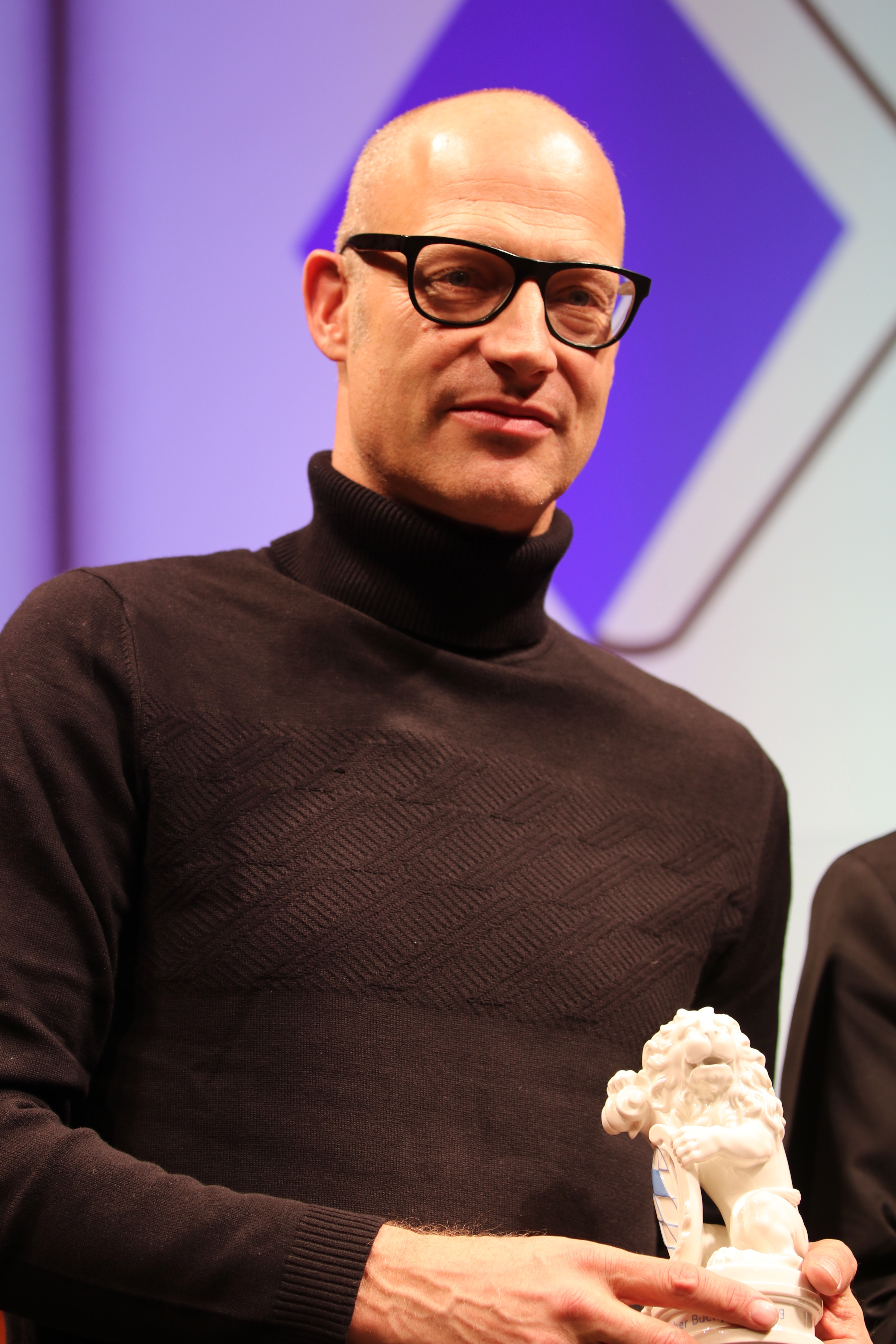 Joachim Meyerhoff - ausgezeichnet mit dem Ehrenpreis des Bayerischen Ministerpräsidenten beim Bayerischen Buchpreis 2019 in der Münchner Allerheiligenhofkirche